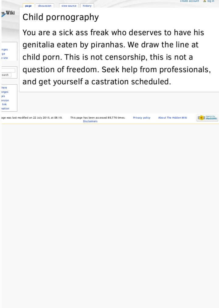 Hidden Wikin mielipide lapsipornosta